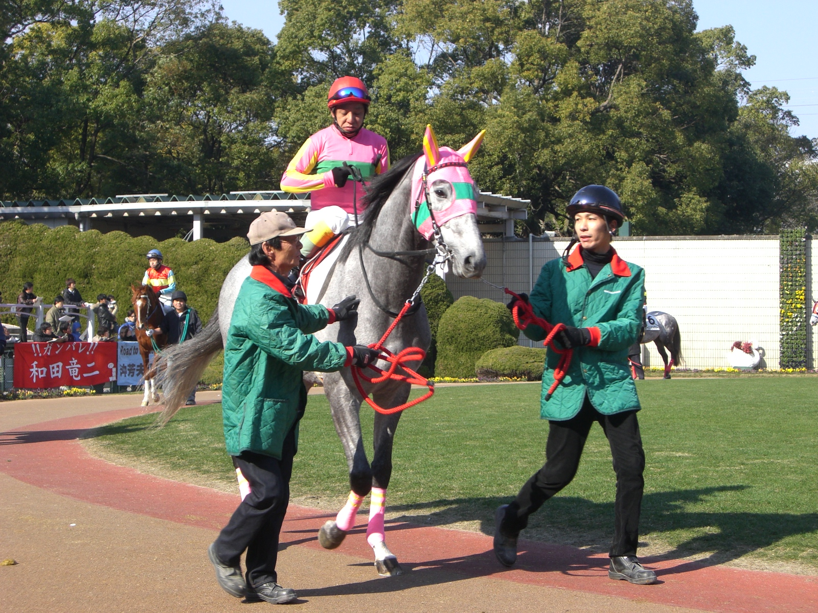 テイエムハリアー 2010/1/17京都競馬場